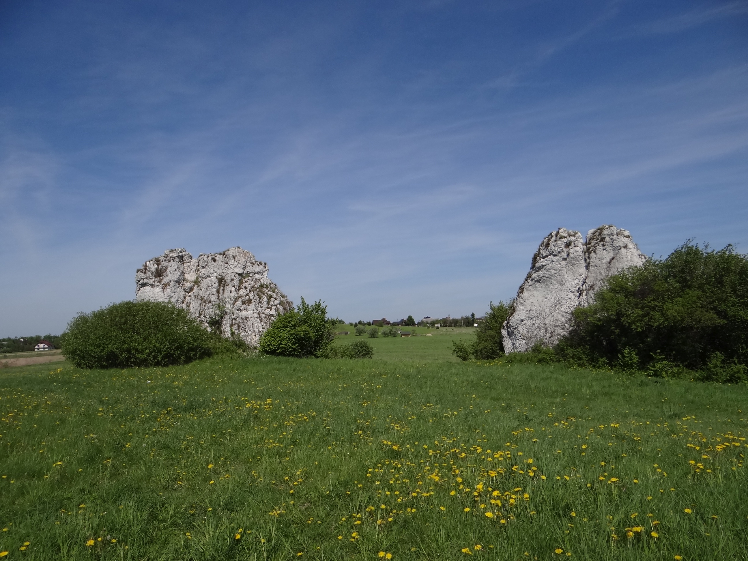 Polna Skałka i Ostry Kamień w grupie Ostańców Jerzmanowickich